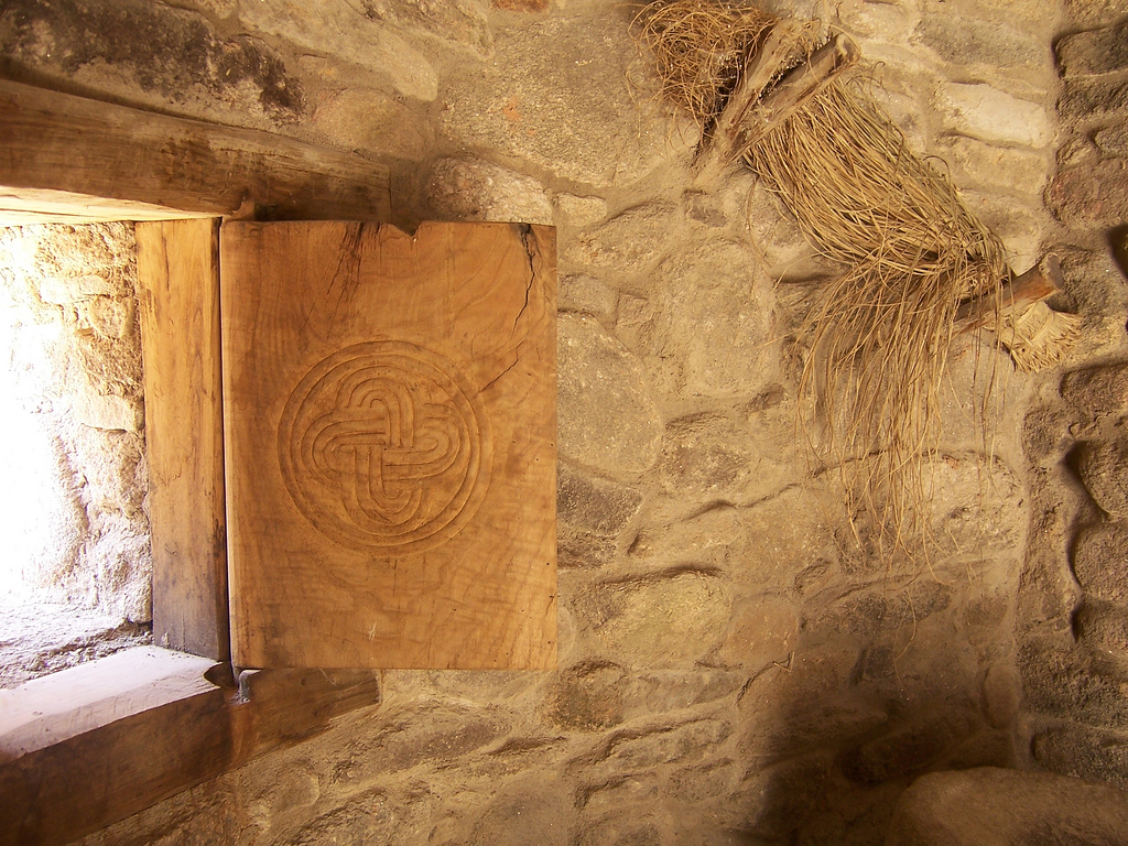 Contraventana de madera, con cordado grabado, en el anexo de la vivienda castrexa.